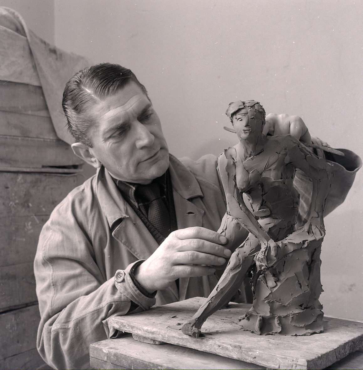 Servizio fotografico : Italia, 1975 / Paolo Monti. - Buste: 2, Fototipi: 2 : Negativo b/n, gelatina bromuro d'argento/ pellicola ; 6x6. - ((Serie costituita da 2 negativi identificati con i nn.: 23477-23475. Sulla busta R23474 manoscritto: "Scultore/ Ferreri." La suddetta serie è contenuta nella scatola identificata con la numerazione 20799-21085. Sulla scatola manoscritto con pennarello nero: "X Triennale". - Fonte: Fattura di Paolo Monti: IV . Commesse/ Fattura n. 32/ Fotografie d'archivio per volume sulla Triennale di Milano (1977/11/28), presso Archivio Paolo Monti. n. 15 fotografie decime Triennale di Milano 1954